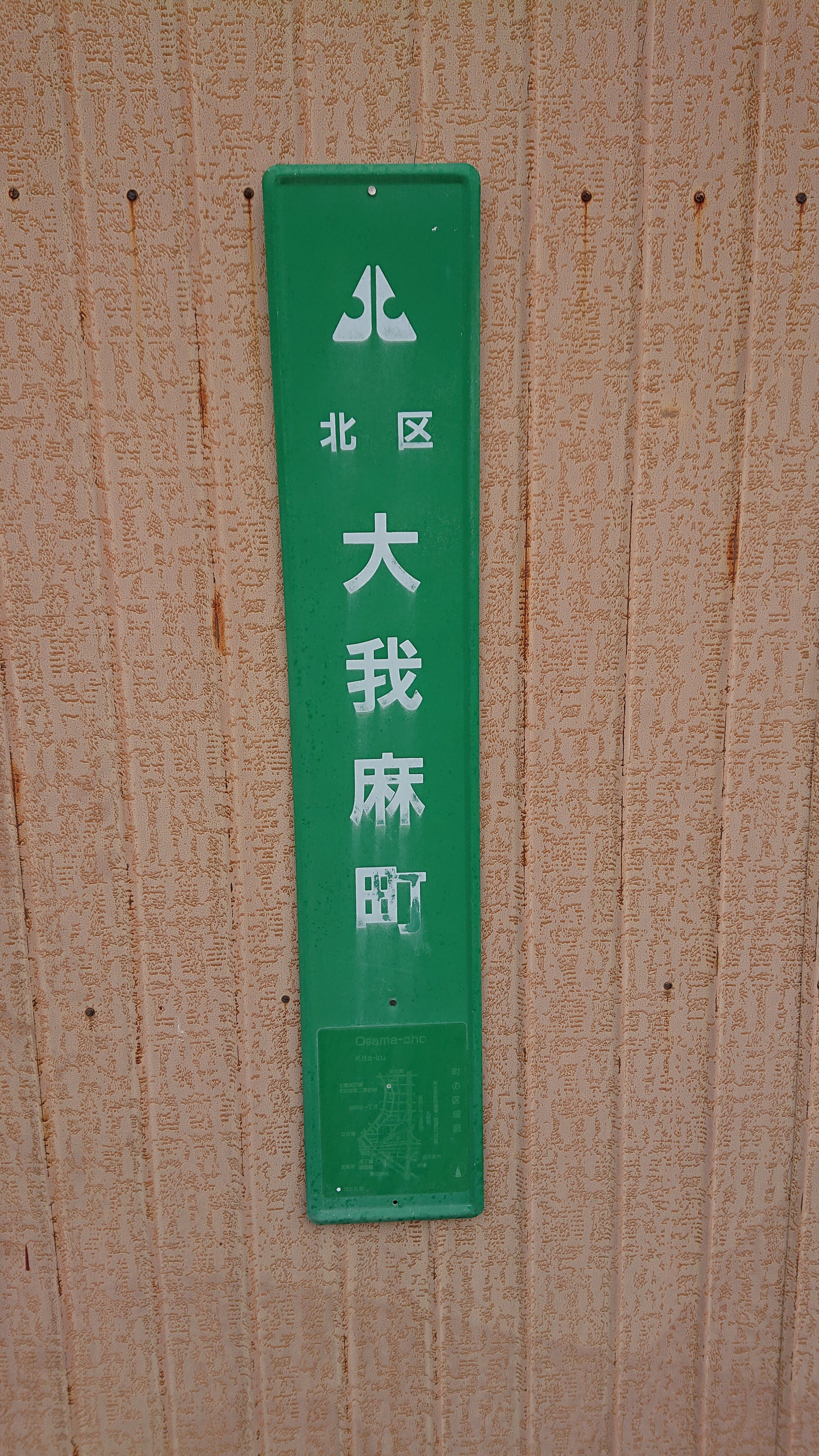 名古屋市北区大我麻町の町名表示